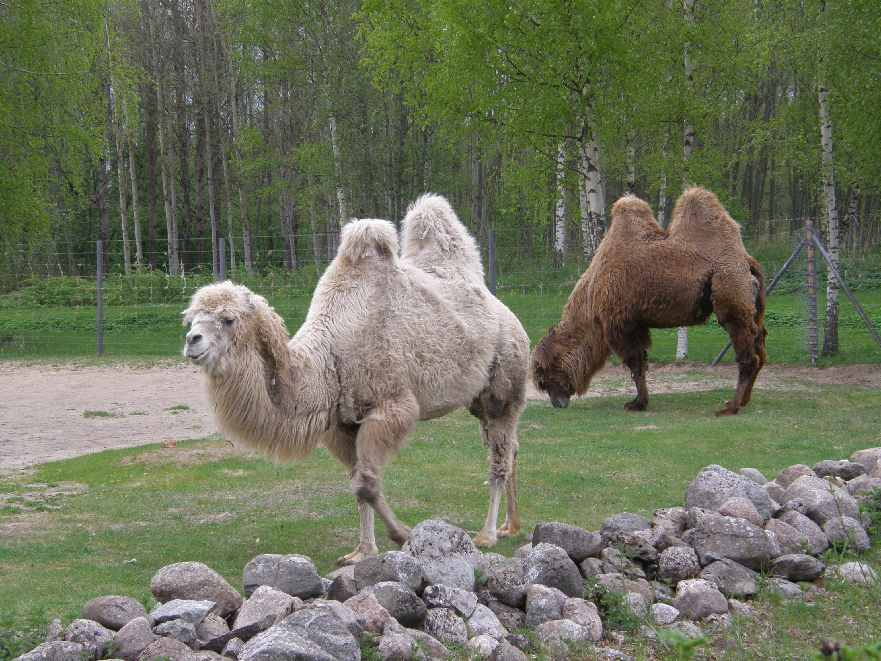 kaksküürkaamel Tallinna Loomaaias